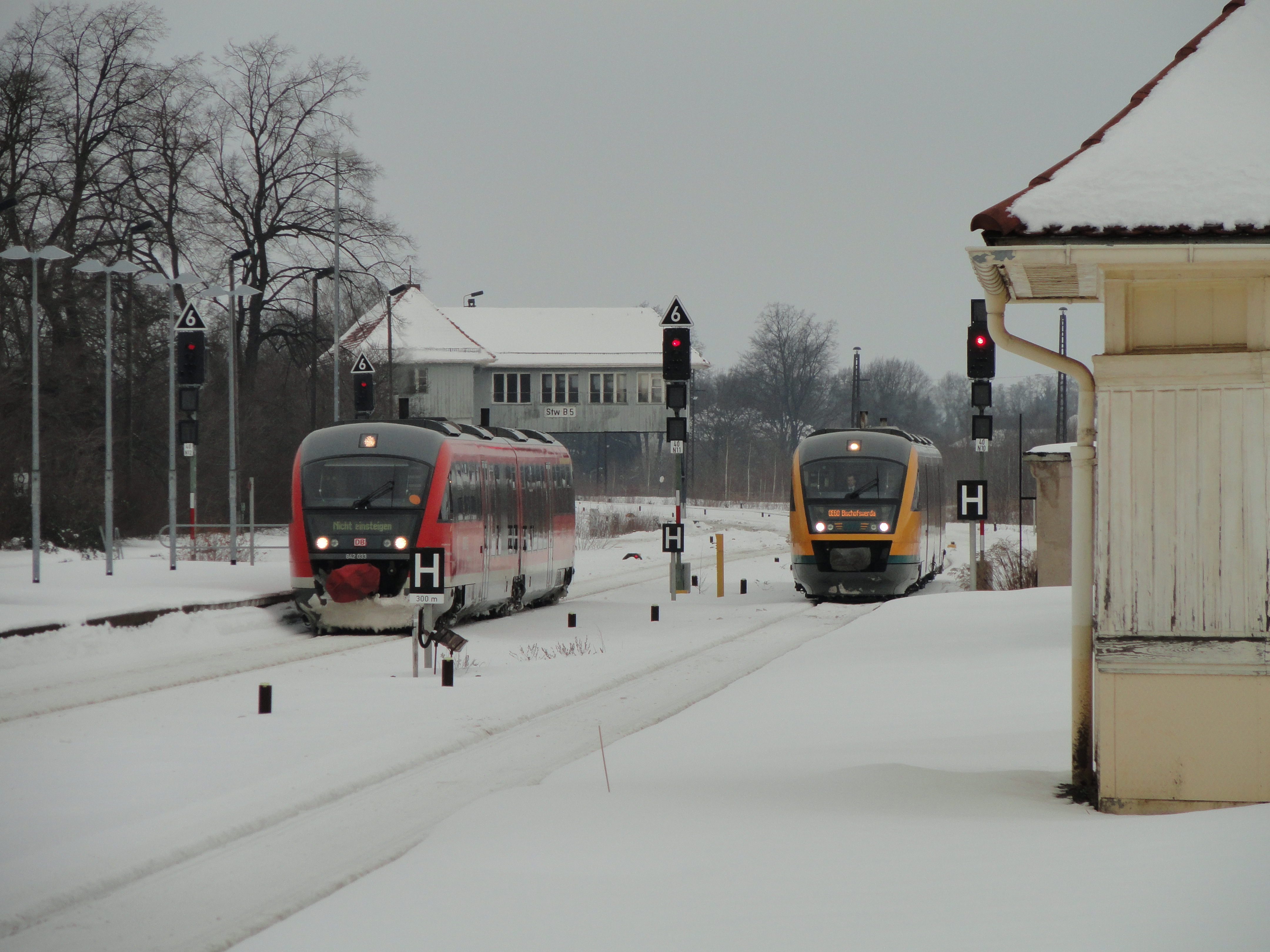 Westausfahrt des Görlitzer Bahnhofes mit Stellwerk B5 und zwei Siemens Desiro